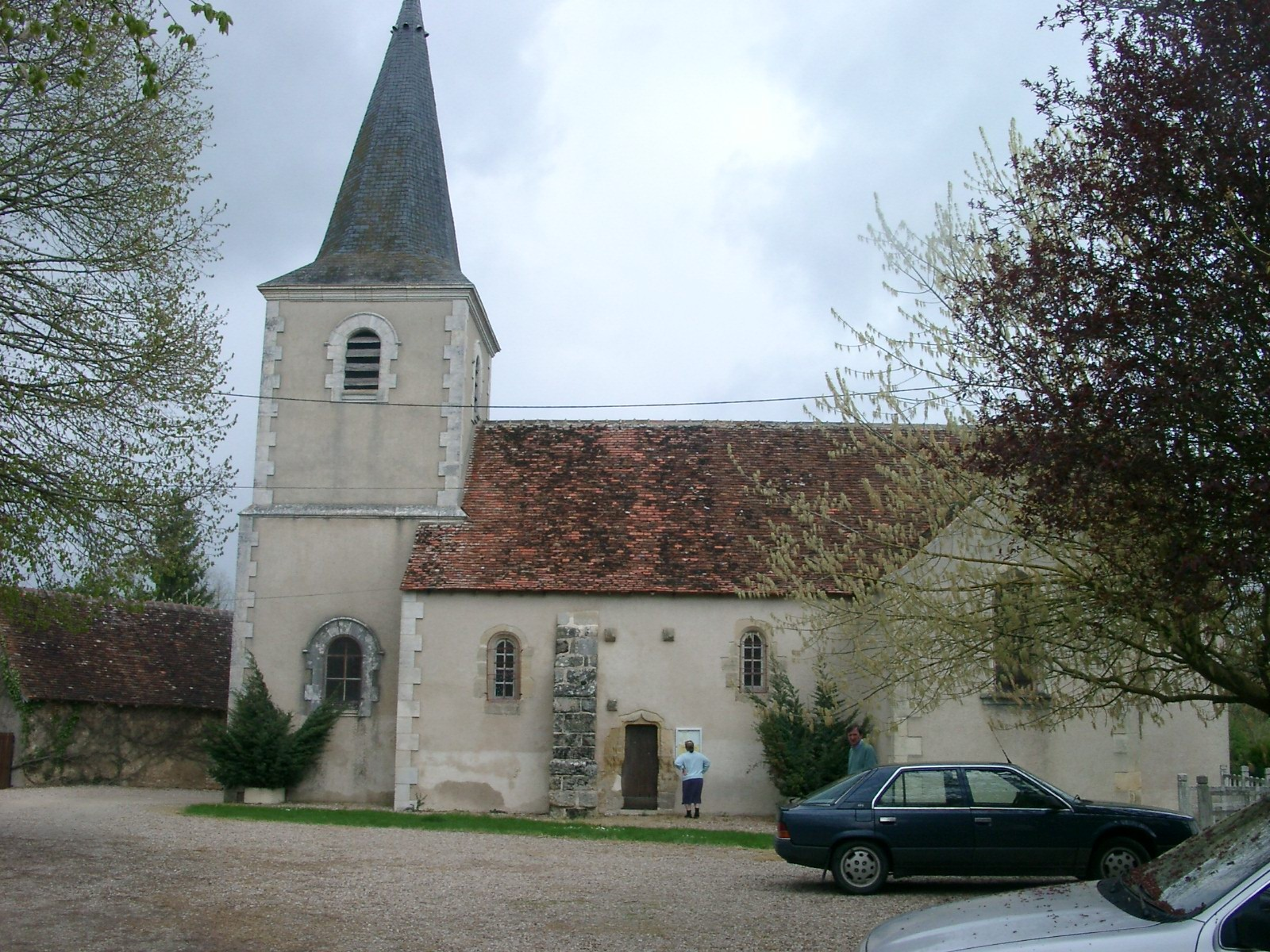 Eglise paroissiale Saint Didier datant du 15ème siècle, commune de Chéry -Cher